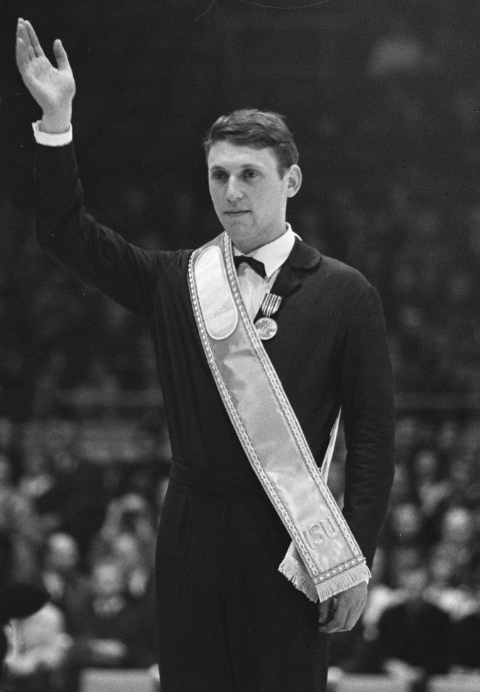 Wereldkampioenschappen te Dortmund, Alain Calmat op erepodium